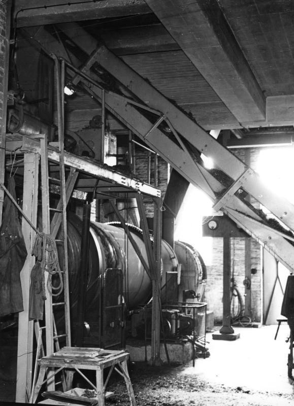 Landwirtschaftliche Aufnahmen in Oedt bei Viersen am 24.9.1957 Grünfuttertrocken-Anlage Information added by Wikimedia users.